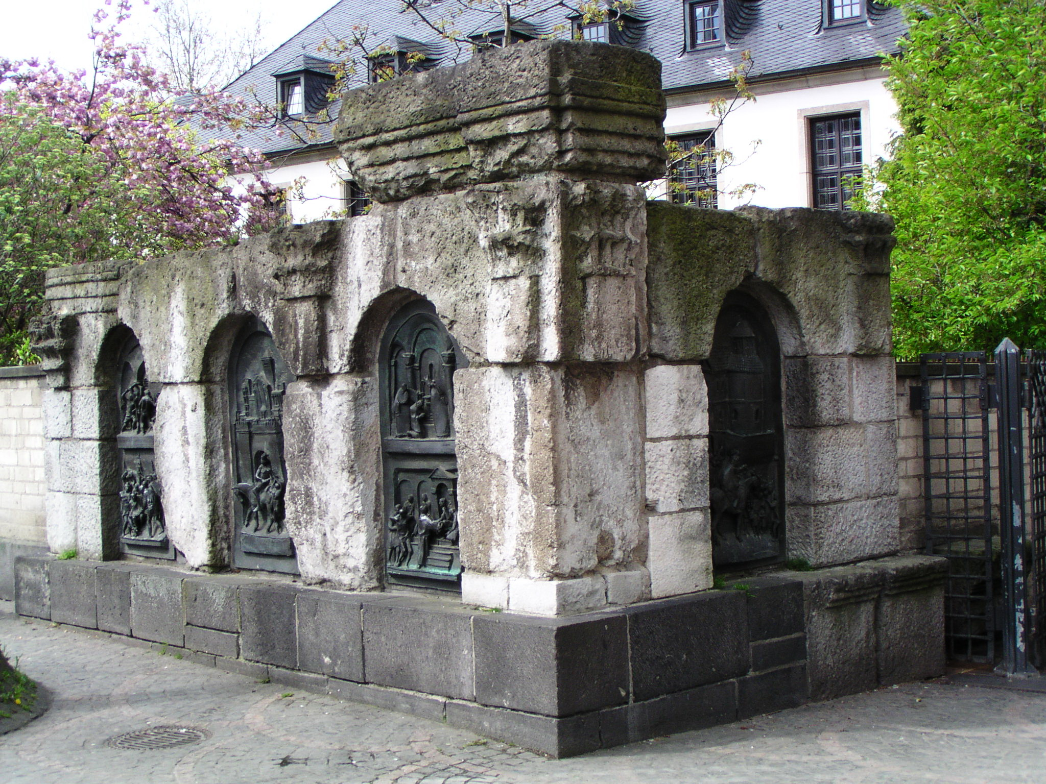 Das Martins-Relief am Bonner Martinsplatz wurde von Ernemann Sander zwischen 1982 und 1983 geschaffen. Die Tafeln zeigen nicht nur bedeutende Szenen aus dem Leben des Heiligen Martin, sondern auch die alte Martinskirche mit Martinszug.